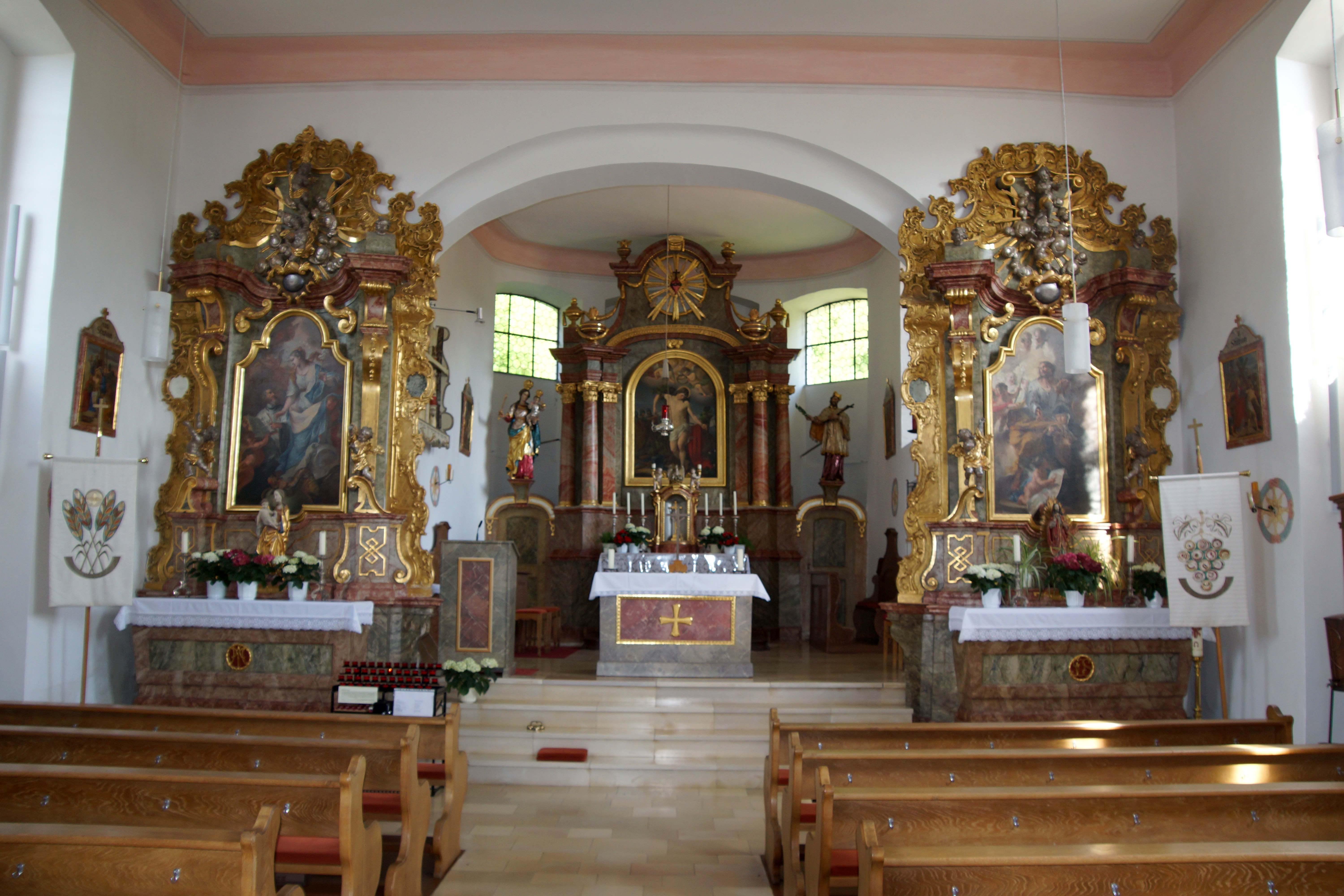 Die katholische Wallfahrtskirche St. Sebastian in Arnsberg im Altmühltal